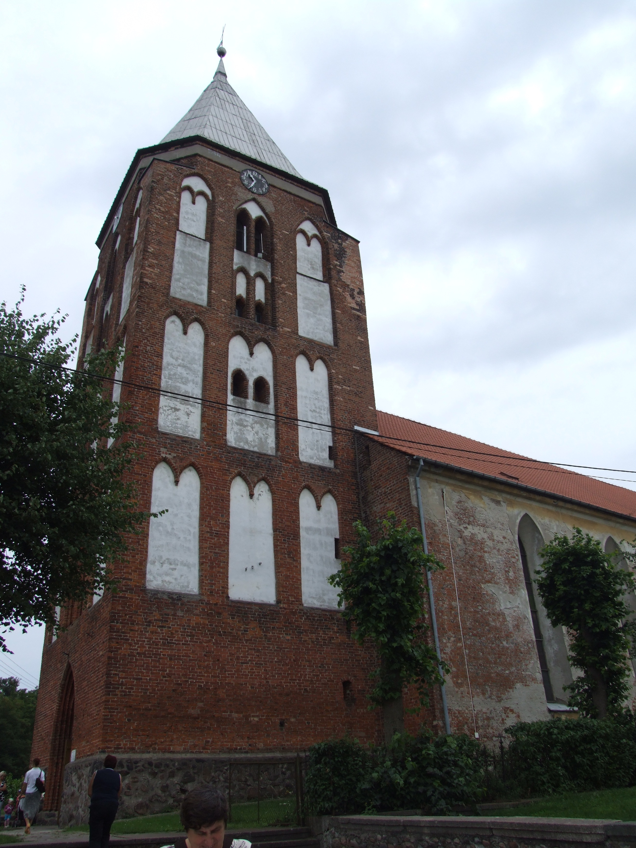 Miłakowo - kościół św. Elżbiety Turyńskiej i św. Wojciecha z fragmentami wyposażenia wnętrza (zabytek nr rejestr. A-207 z 11.03.1957)